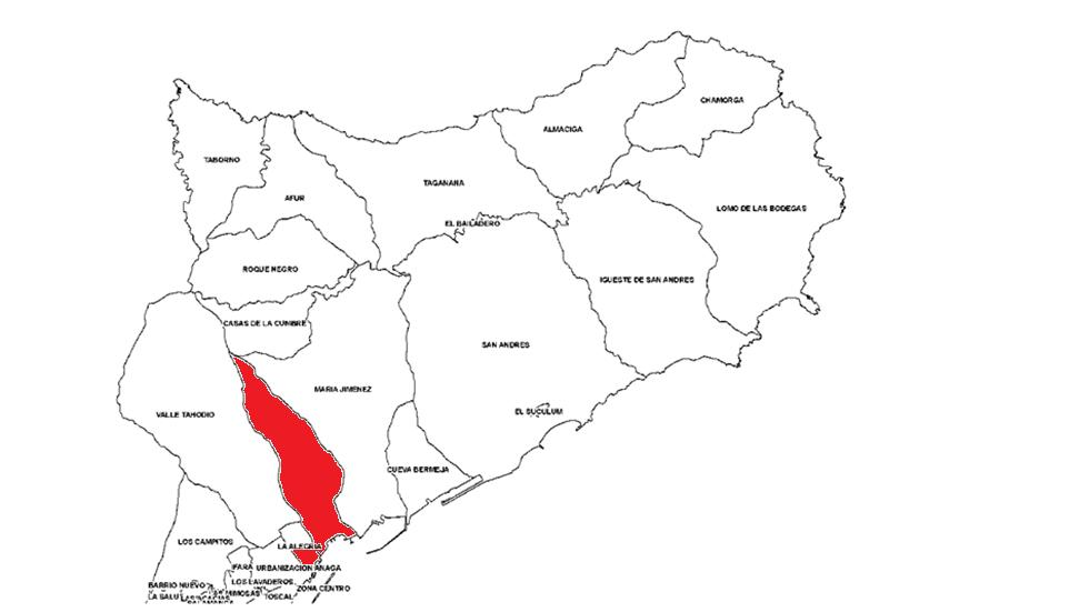 Localizacion de Valleseco en el distrito Anaga